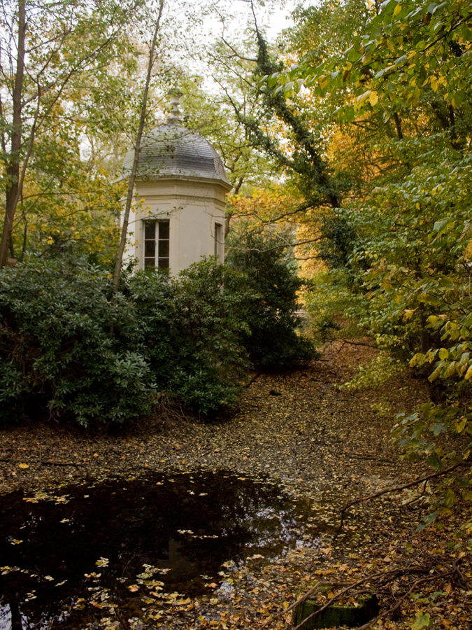 Het theekoepeltje van kasteel Laarhof te Reet (Rumst)